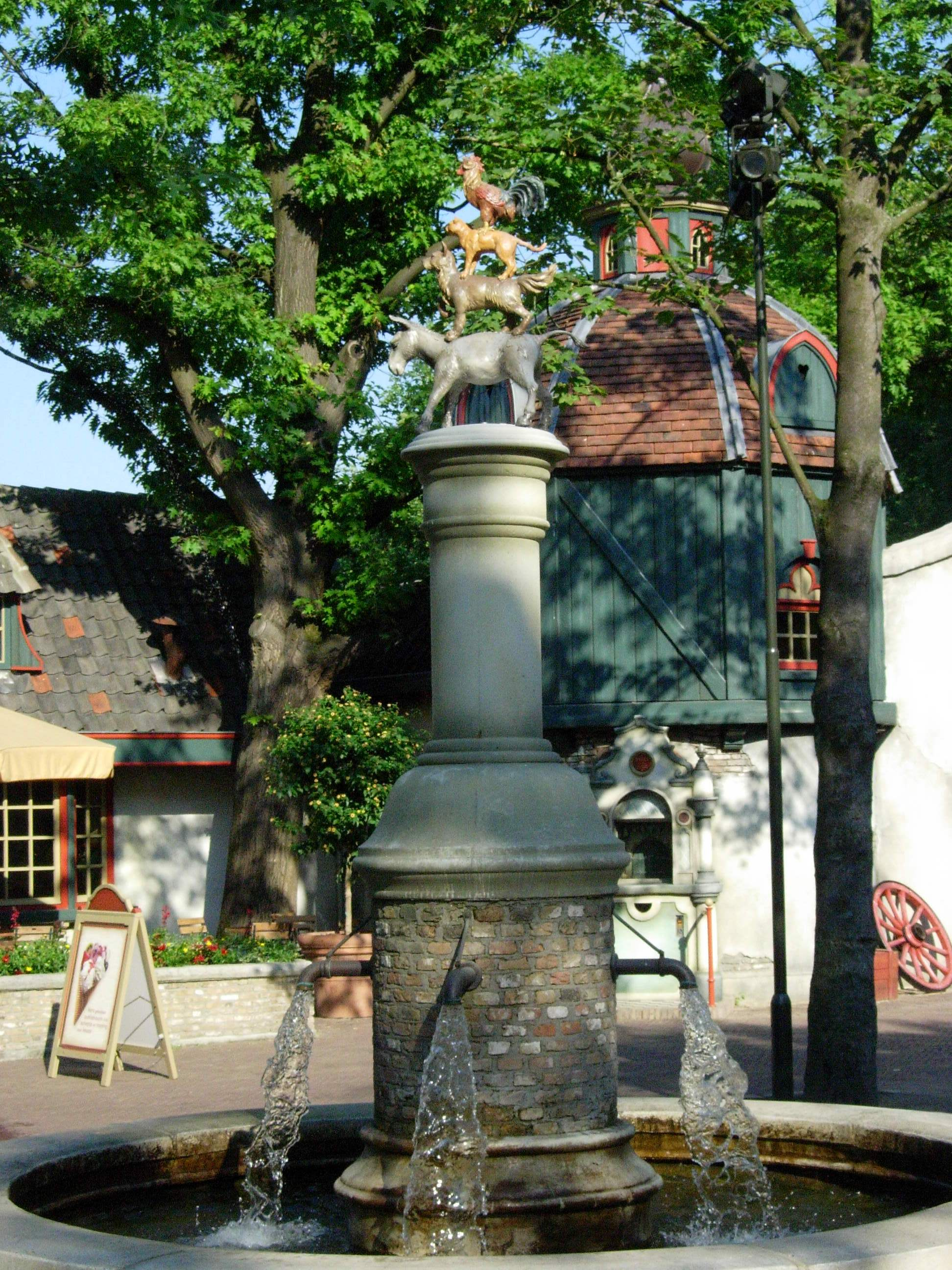 Les Musiciens de Brême sur la place Anton Pieck